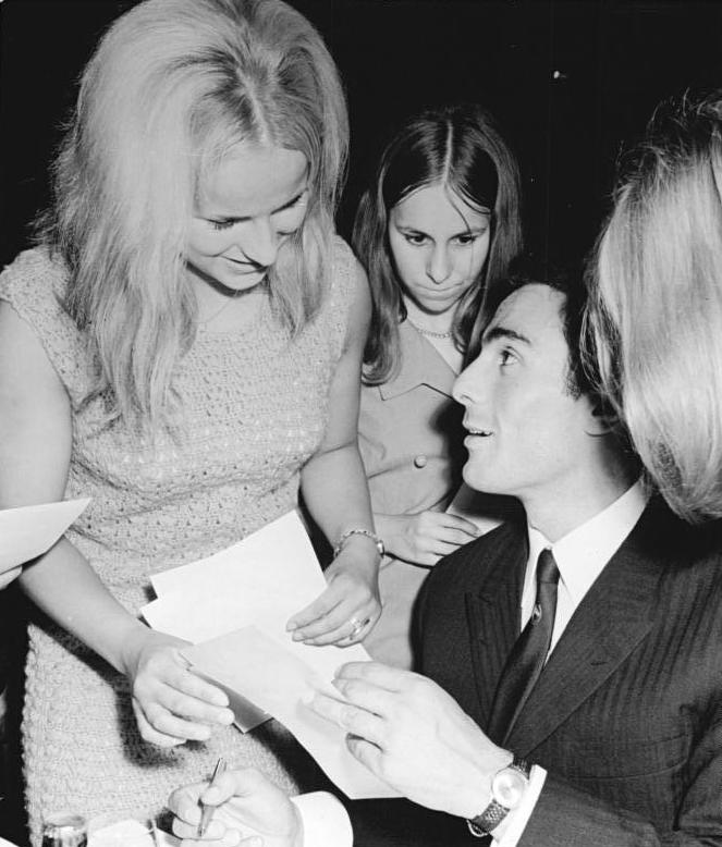 Berlin, Filmball der Jugend, Gojko Mitic Zentralbild Spremberg 3.7.1967 Berlin: Filmball der Jugend in der Kongreßhalle Von den Autogrammjägern dicht umlagert war beim Filmball der Berliner Jugend am 2.7. in der Kongreßhalle anläßlich der Sommerfilmtage der Hauptdarsteller der DEFA- Filmes "Chingachgock- Die Große Schlange", der jugoslawische Schauspieler Goyko Mitic. Abgebildete Personen: Mitic, Gojko: Schauspieler, Jugoslawien (PND 118582798)